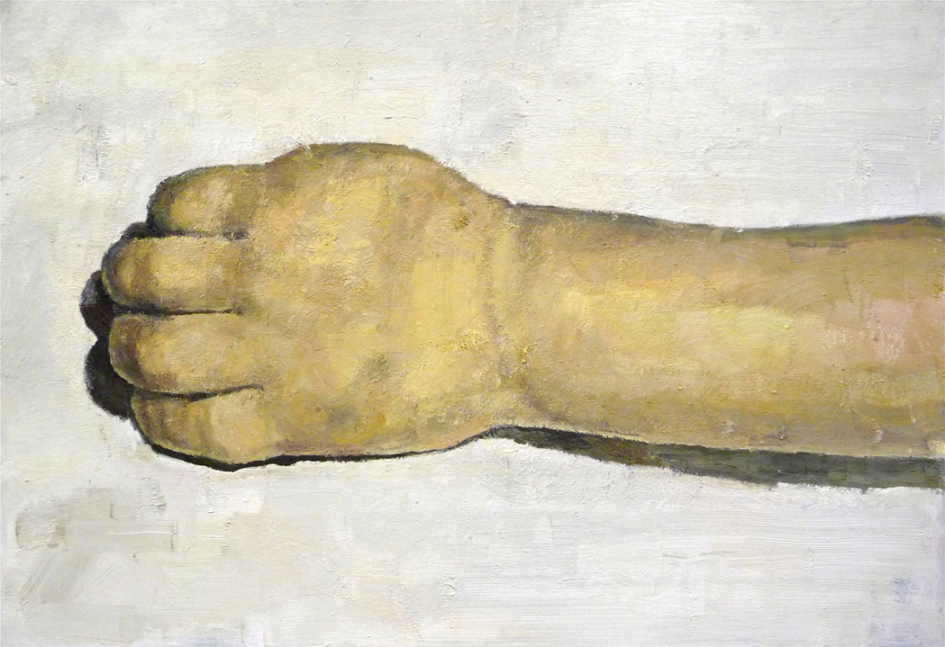 Heike Ruschmeyer, Lalelu 3, 2008, Ölfarbe auf MDF, 55 x 80 cm